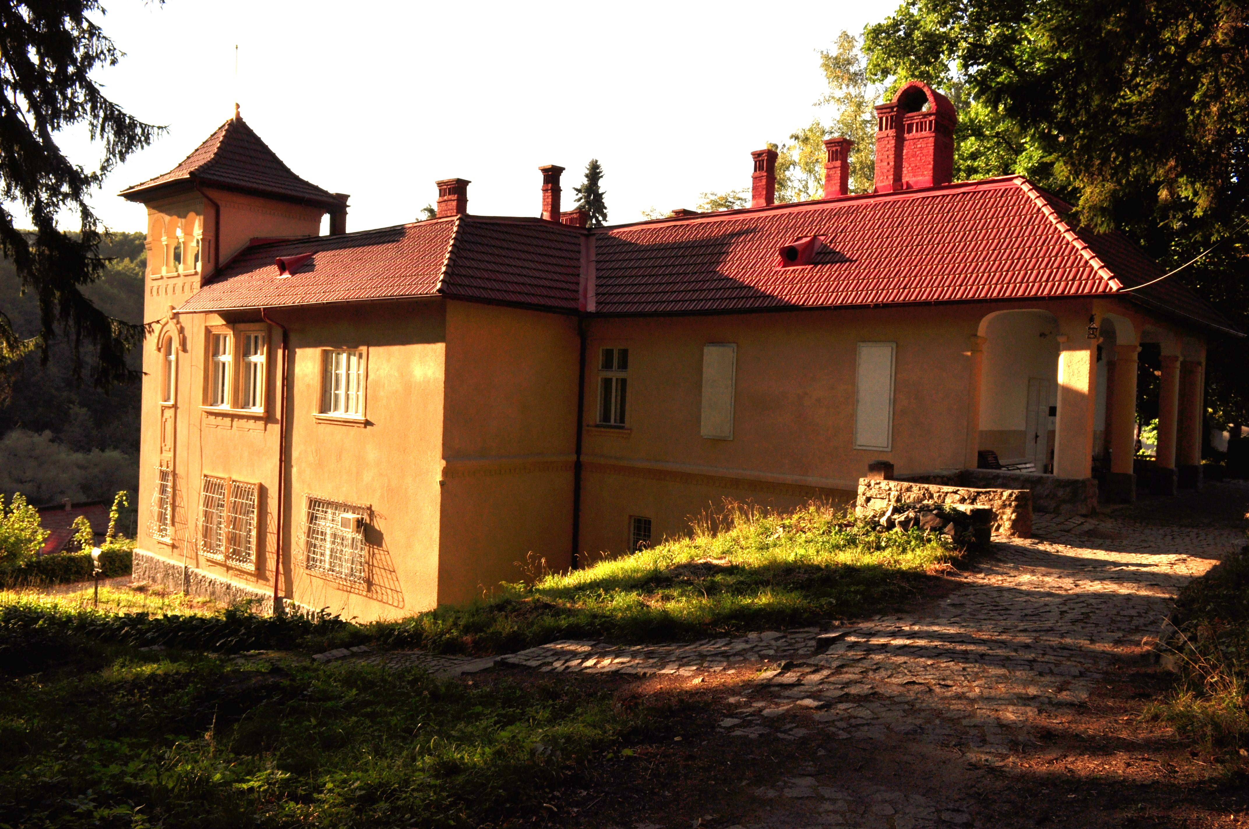 Conacul Octavian Goga 01